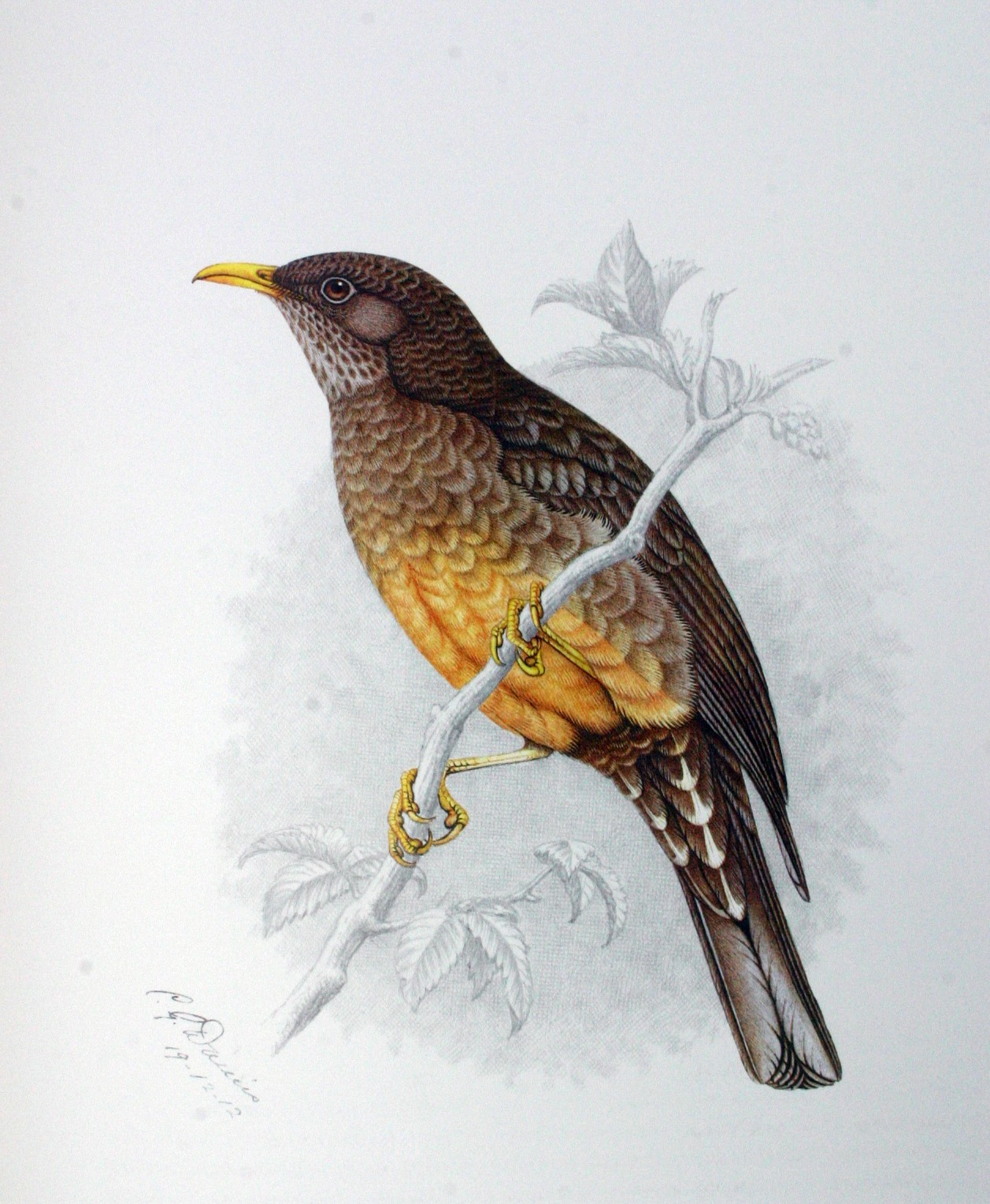 Olive Thrush (Turdus olivaceus) (adult female)